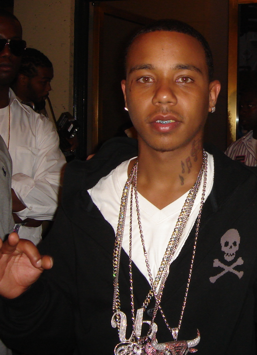 Nick Leisure & Yung Berg